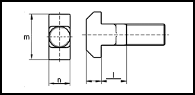 DIN 186